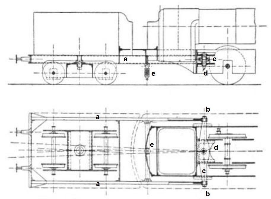 Stütztender Bauart Engerth-Klose